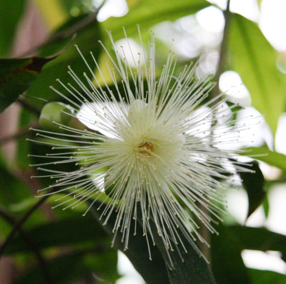 Blüte vom Rosenapfel (Syzygium jambos), Jambos, Pomarosa